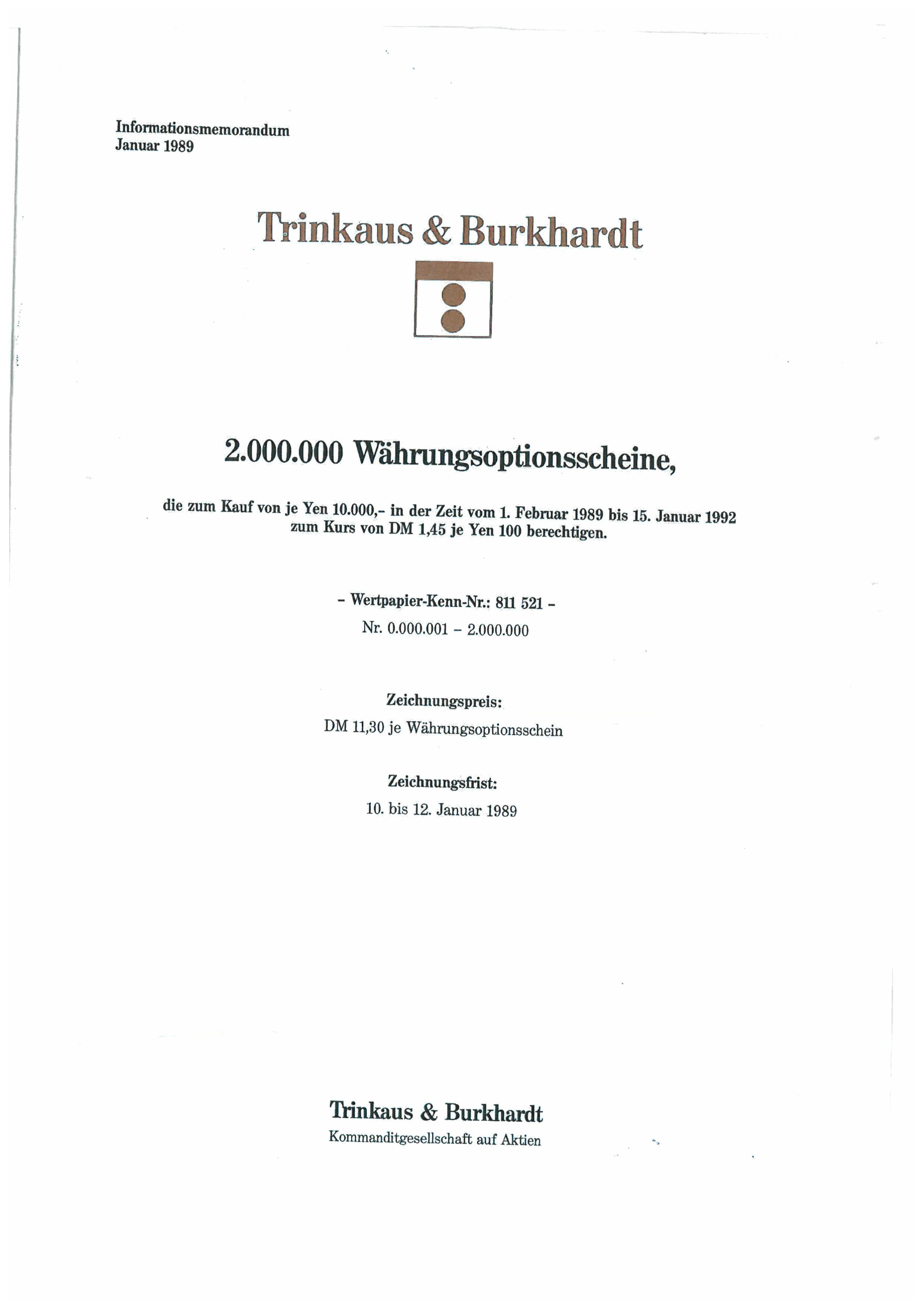 Erster Optionsschein in Deutschland von Trinkaus & Burkhardt KGaA WKN 811521 Jan 1989